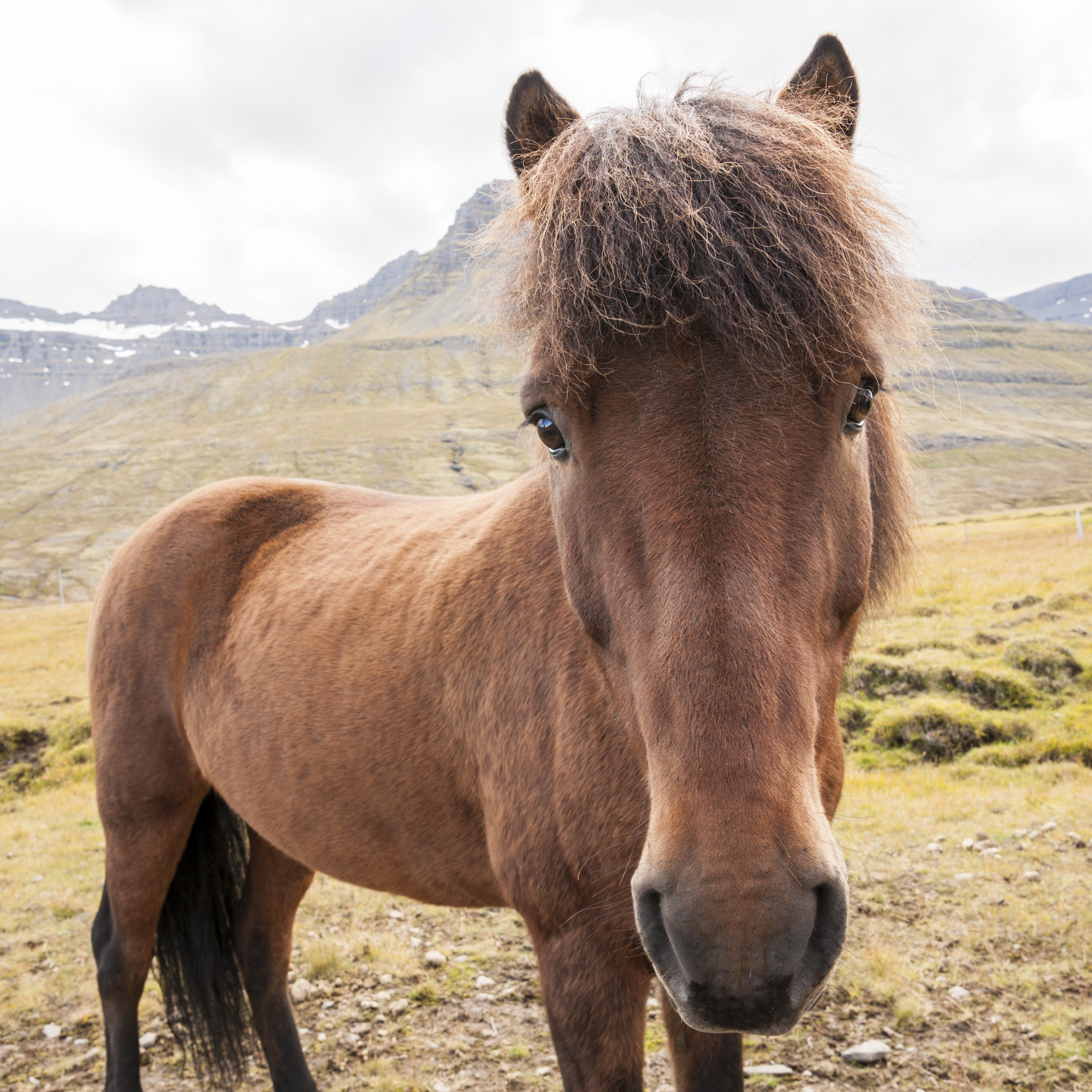 Naturaleza Islandesa